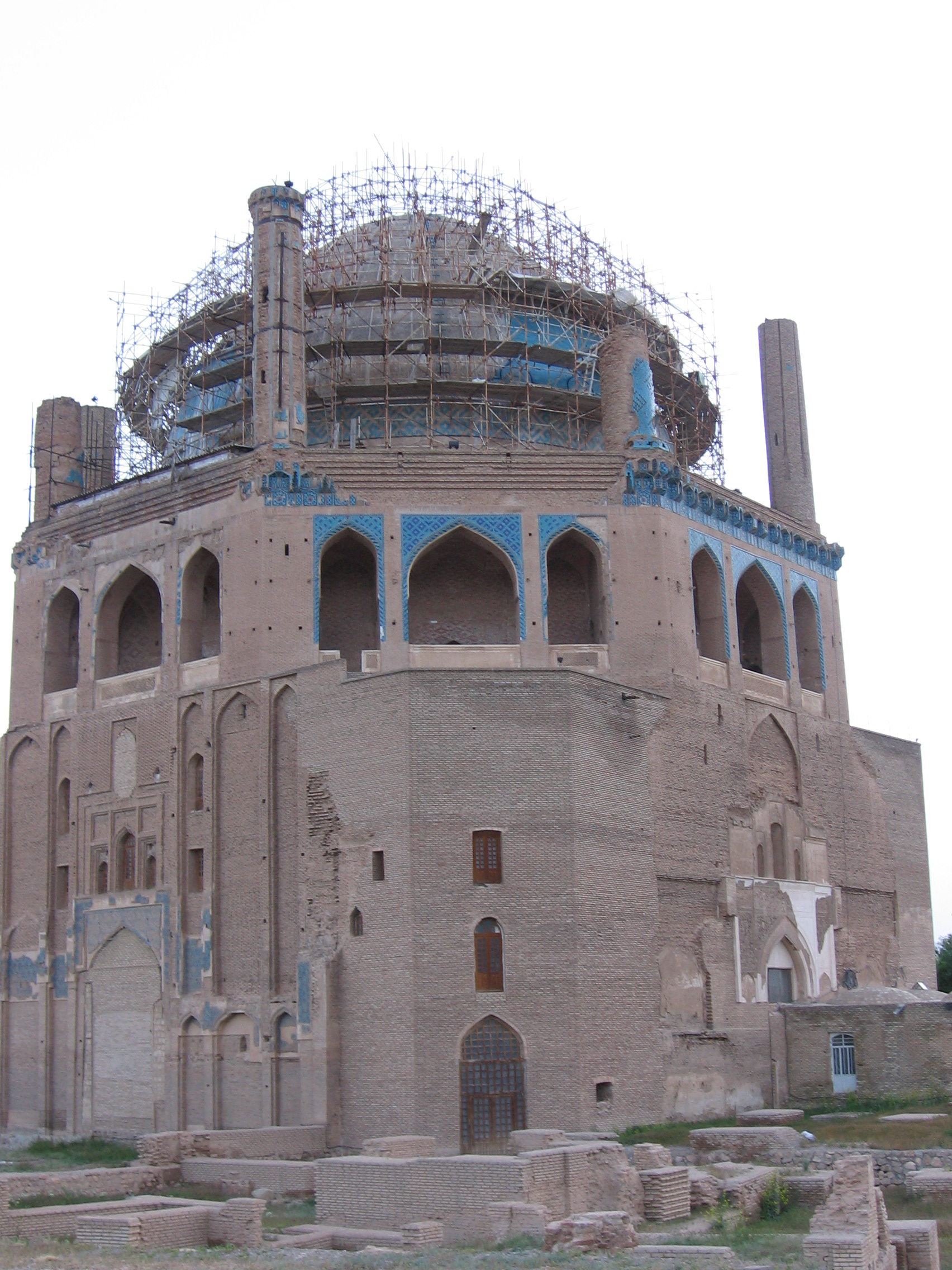 Soltaaniyeh Dome, Soltaaniyeh, Zanjan province, Iran